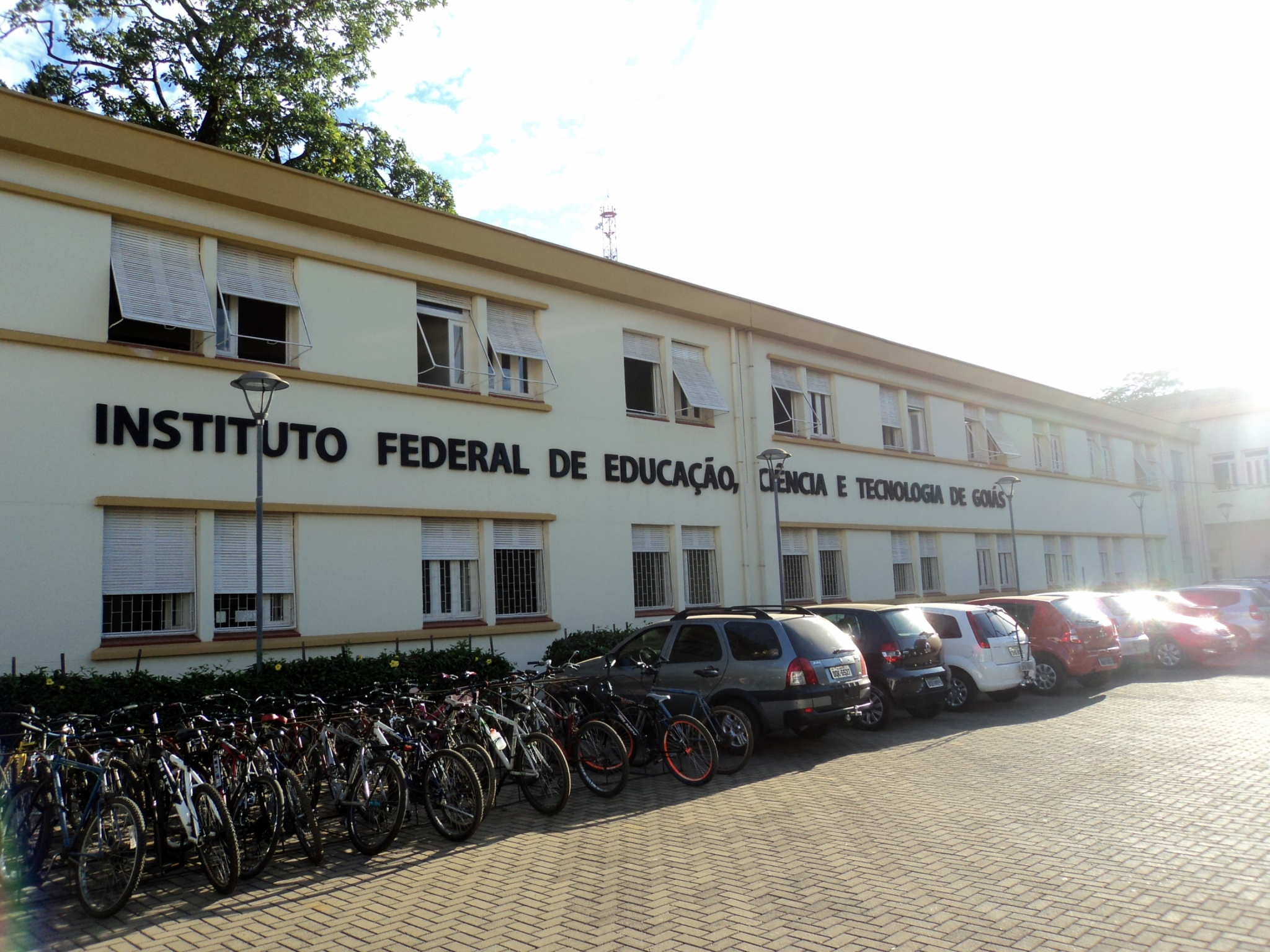 Frente do Instituto Federal de Goiás em 2012.